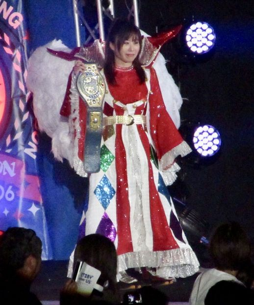 2018年横浜文体